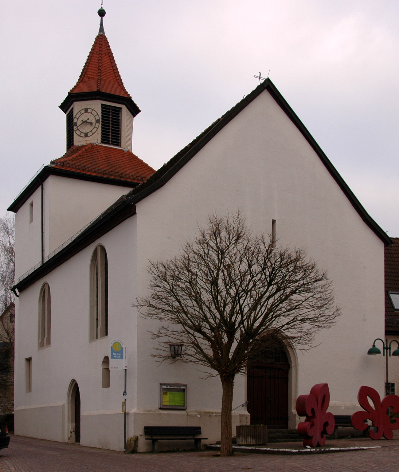 denkmalgeschützte Martinskirche in Lauffen am Neckar.